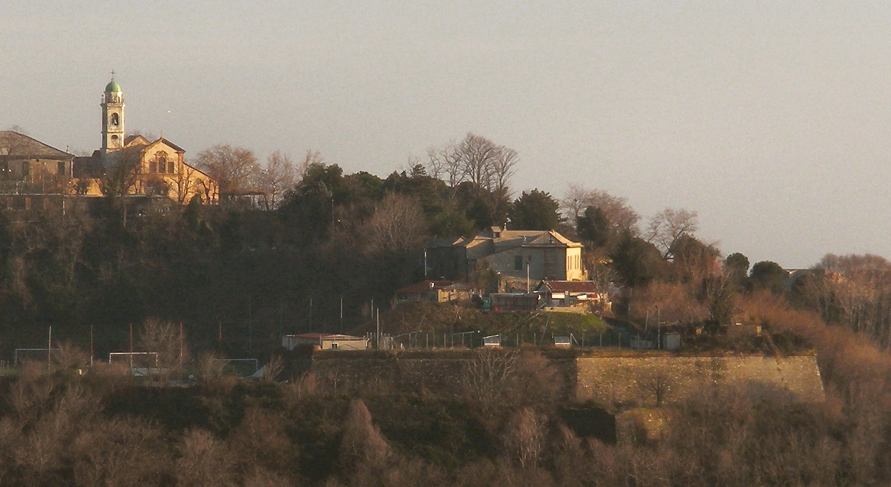 Veduta della collina di Belvedere (Sampierdarena, Genova), con i resti del forte omonimo Foto propria Gennaio 2010